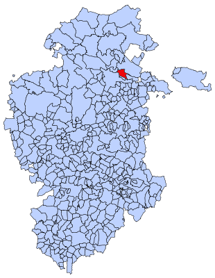 Situación de Frías en el mapa de Burgos.